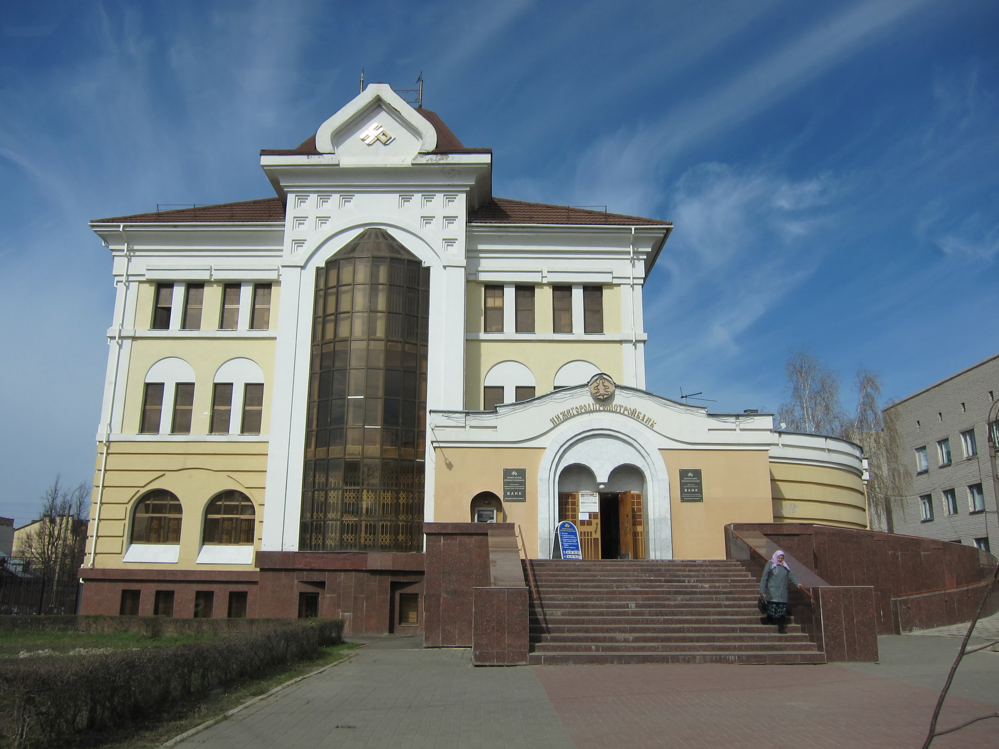 Bank